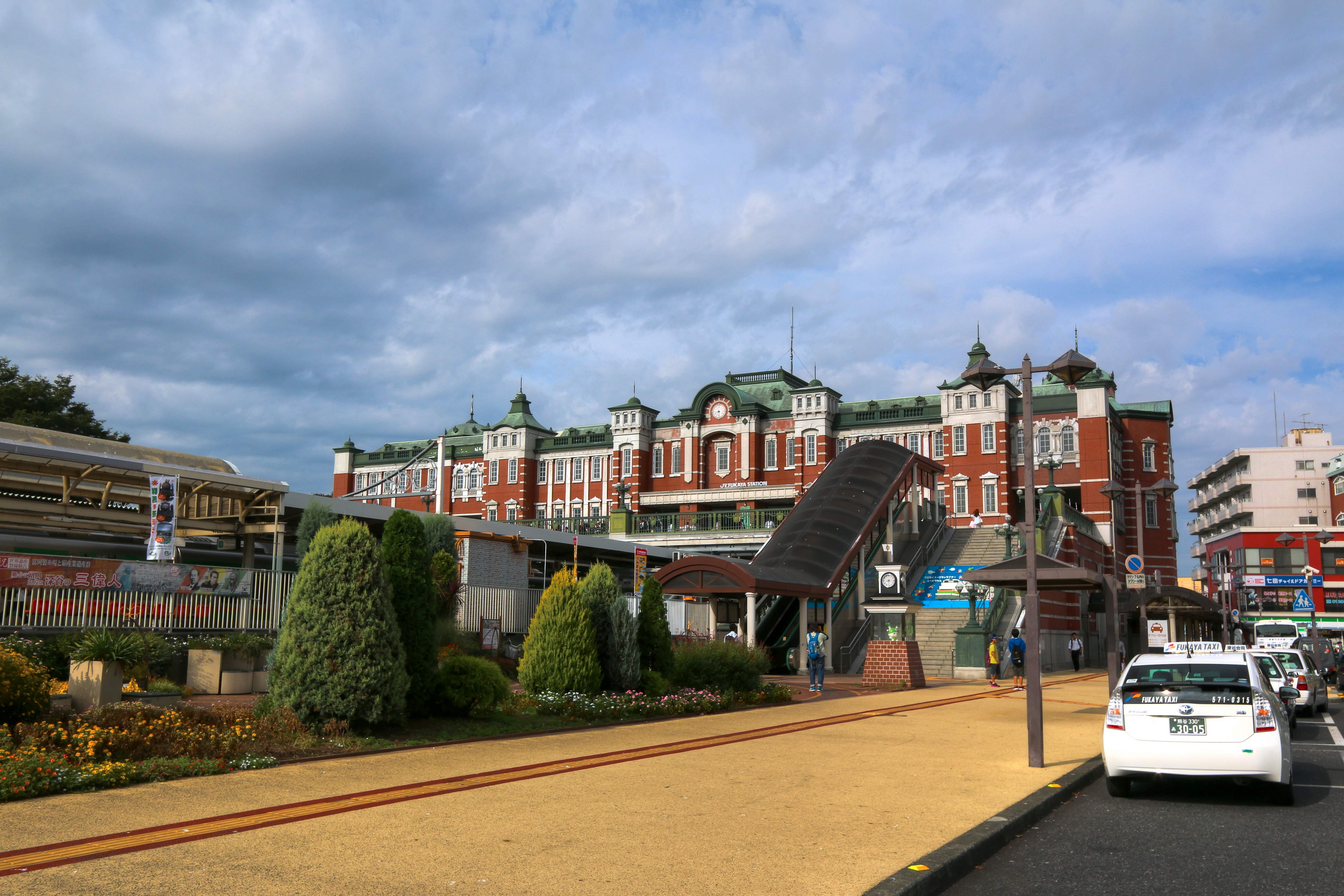 深谷駅